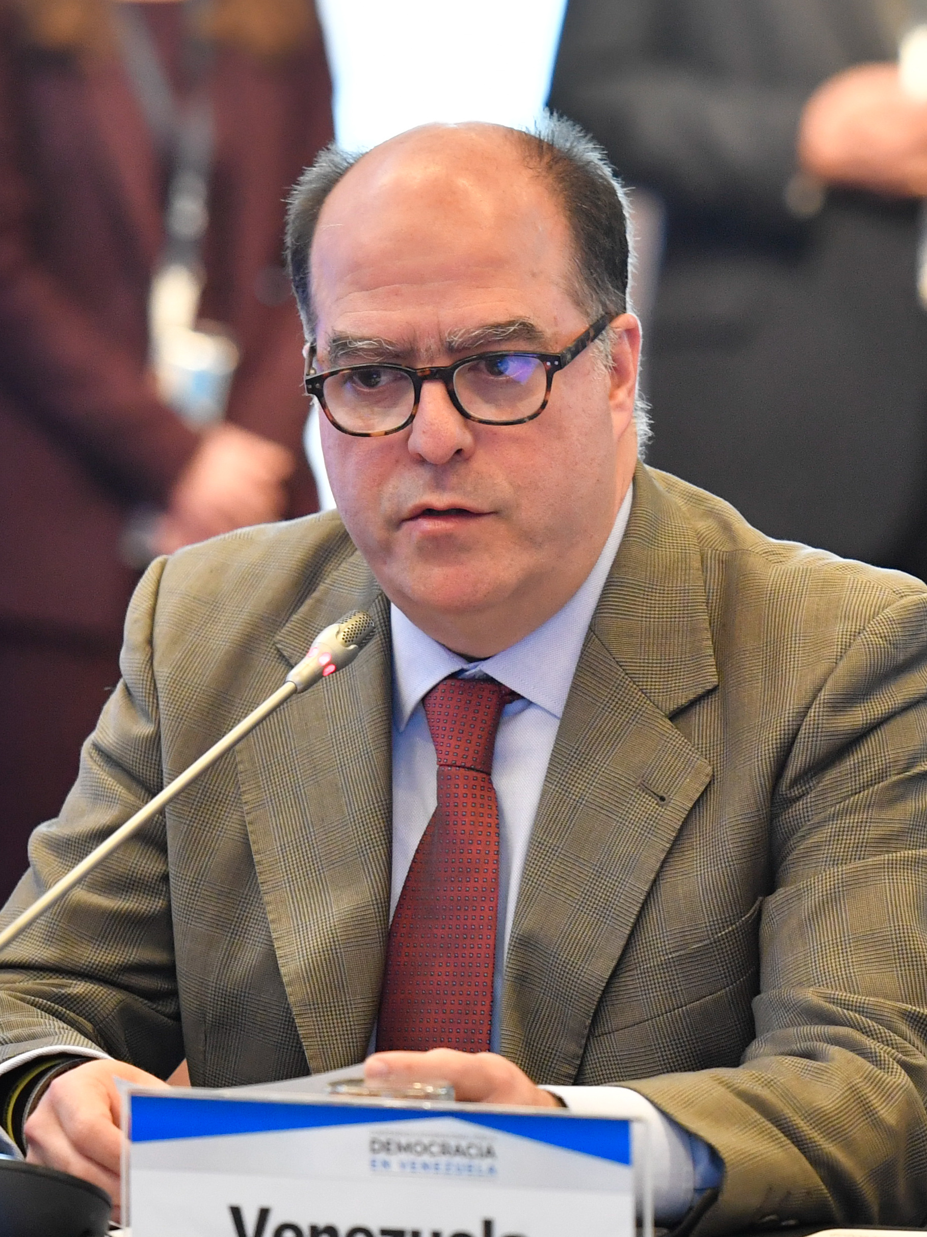 Reunión de países que respaldan al Presidente encargado de Venezuela Juan Guaidó